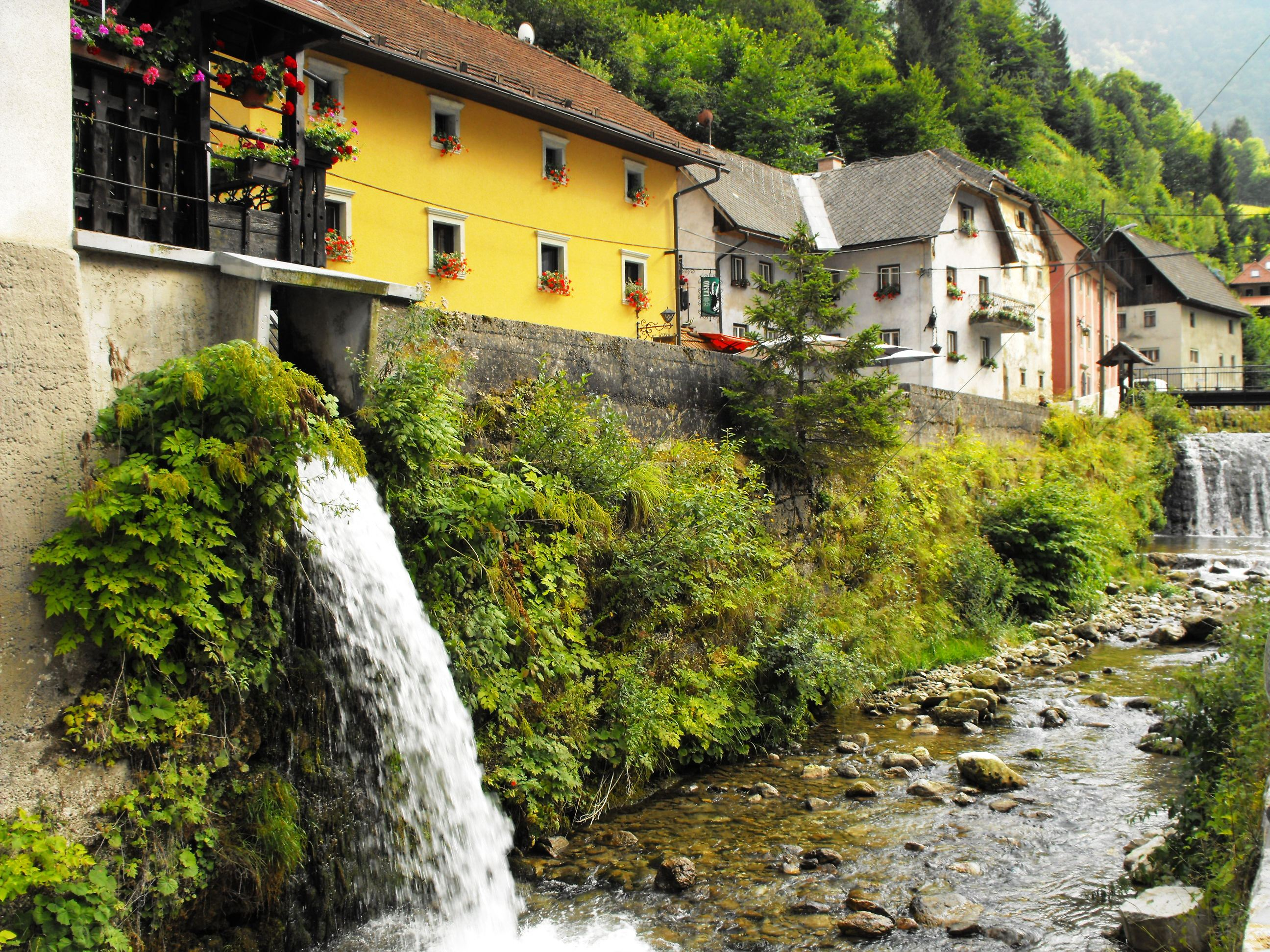 Slovenia, Kruppa Village